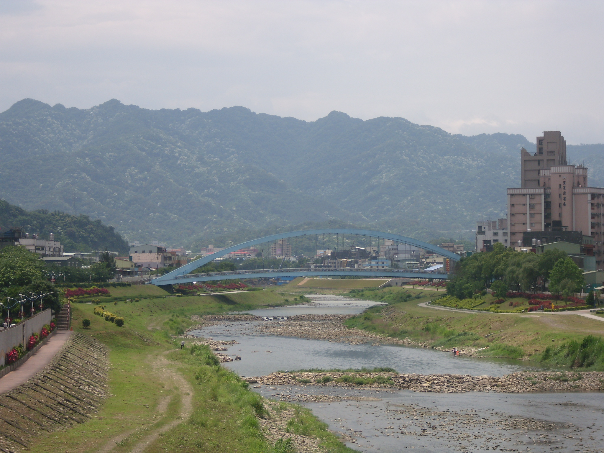 Bân-lâm-gú: 八安大橋，佇新北市三峽區市區內，一爿是八張里，一爿是安溪里。